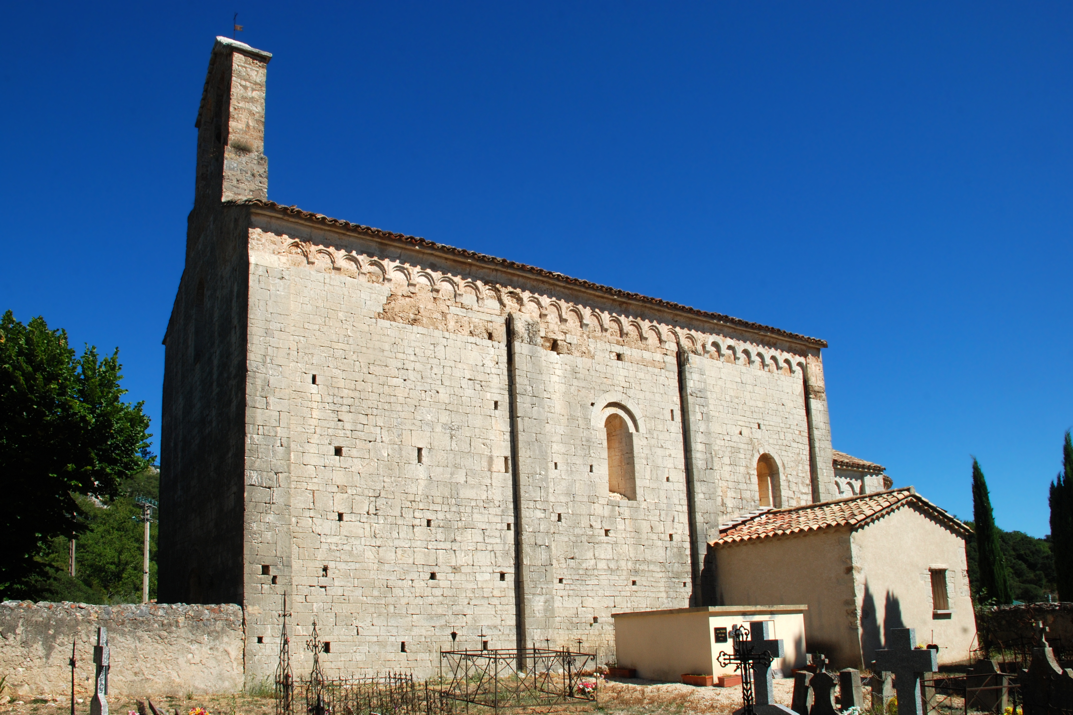 France - Languedoc - Hérault - Église de Saint-André-de-Buèges